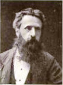 George Smith (1840 – 1876) a Gilgames-eposz megtalálója és lefordítója, amatőr régész.